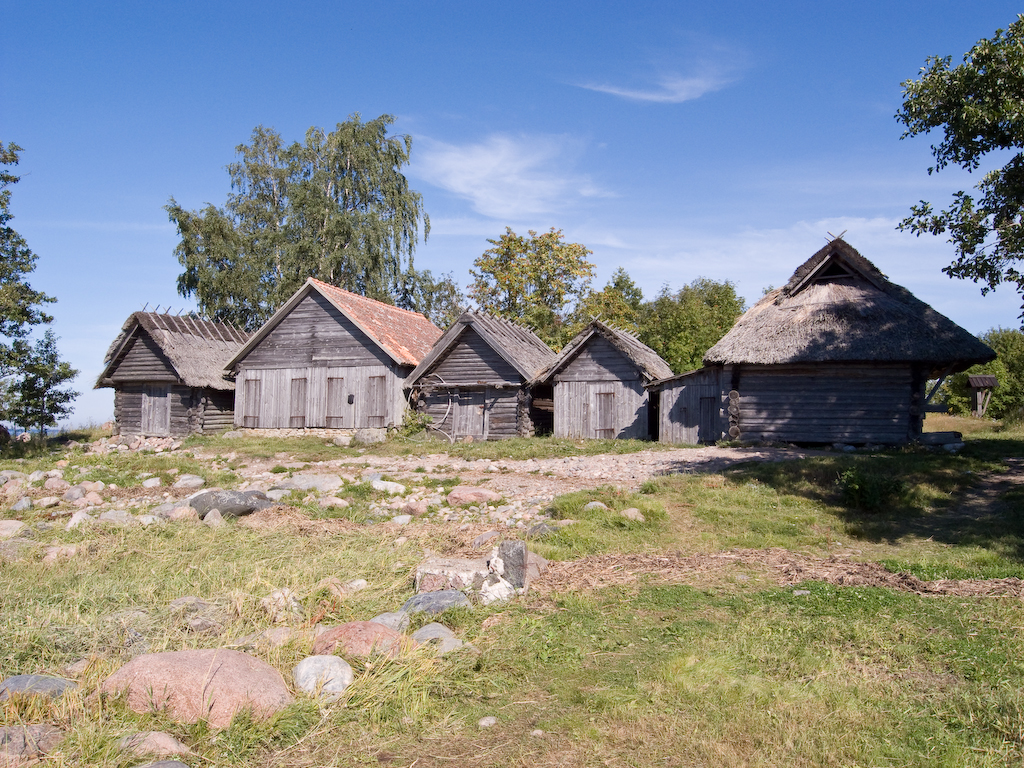 Altja